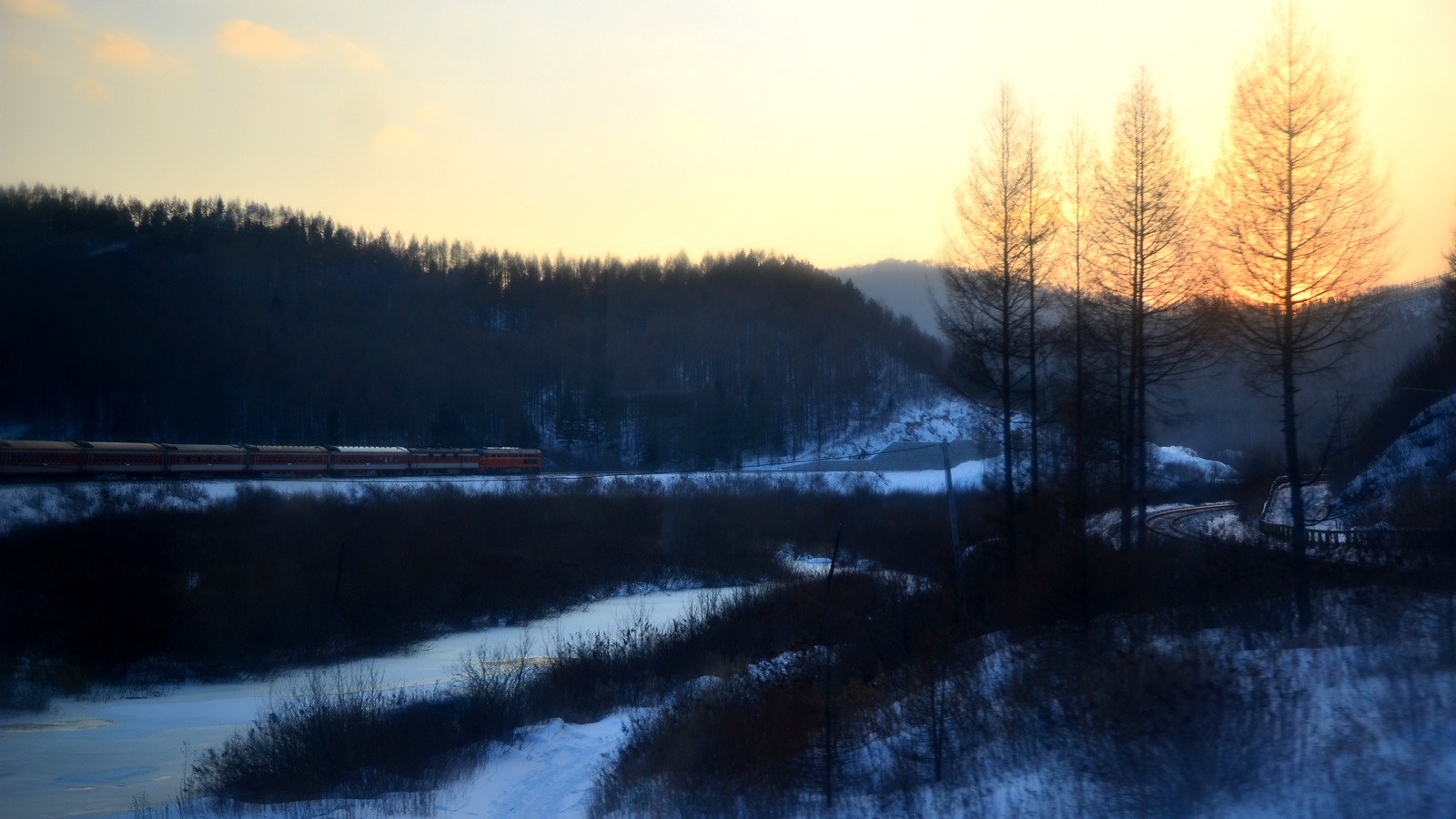 Hailin, Mudanjiang, Heilongjiang, China